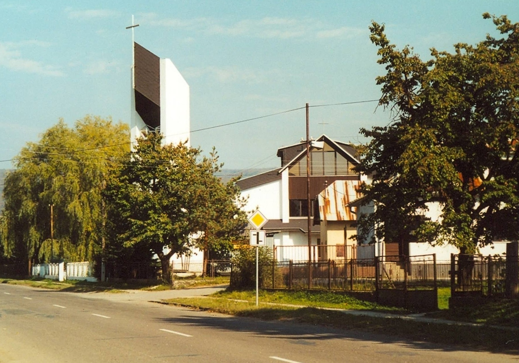 Rímskokatolícky kostol sv. Pia X. postavený v roku 1995.